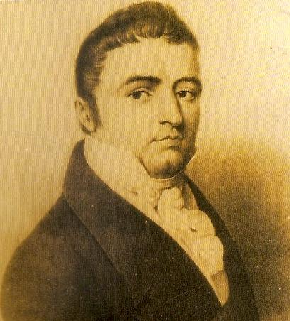 Retrato de Manuel José García en 1834